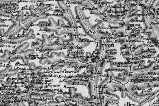 Le Trévoux sur la carte de Cassini.